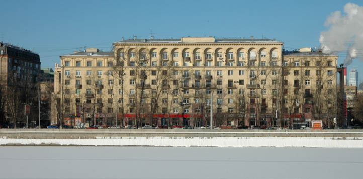 Москва, Фрунзенская набережная, дом 32.